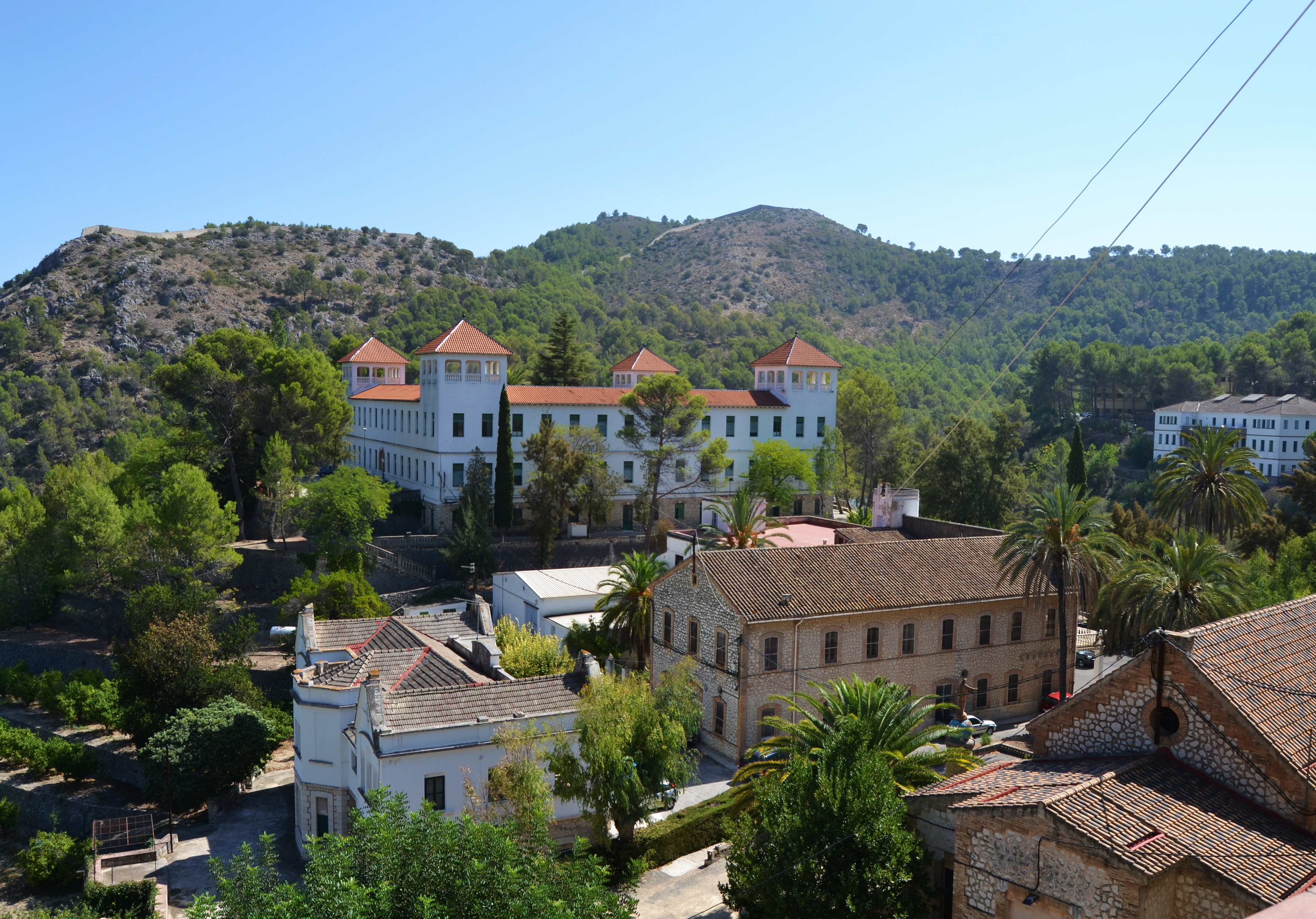 Vista general de Fontilles.